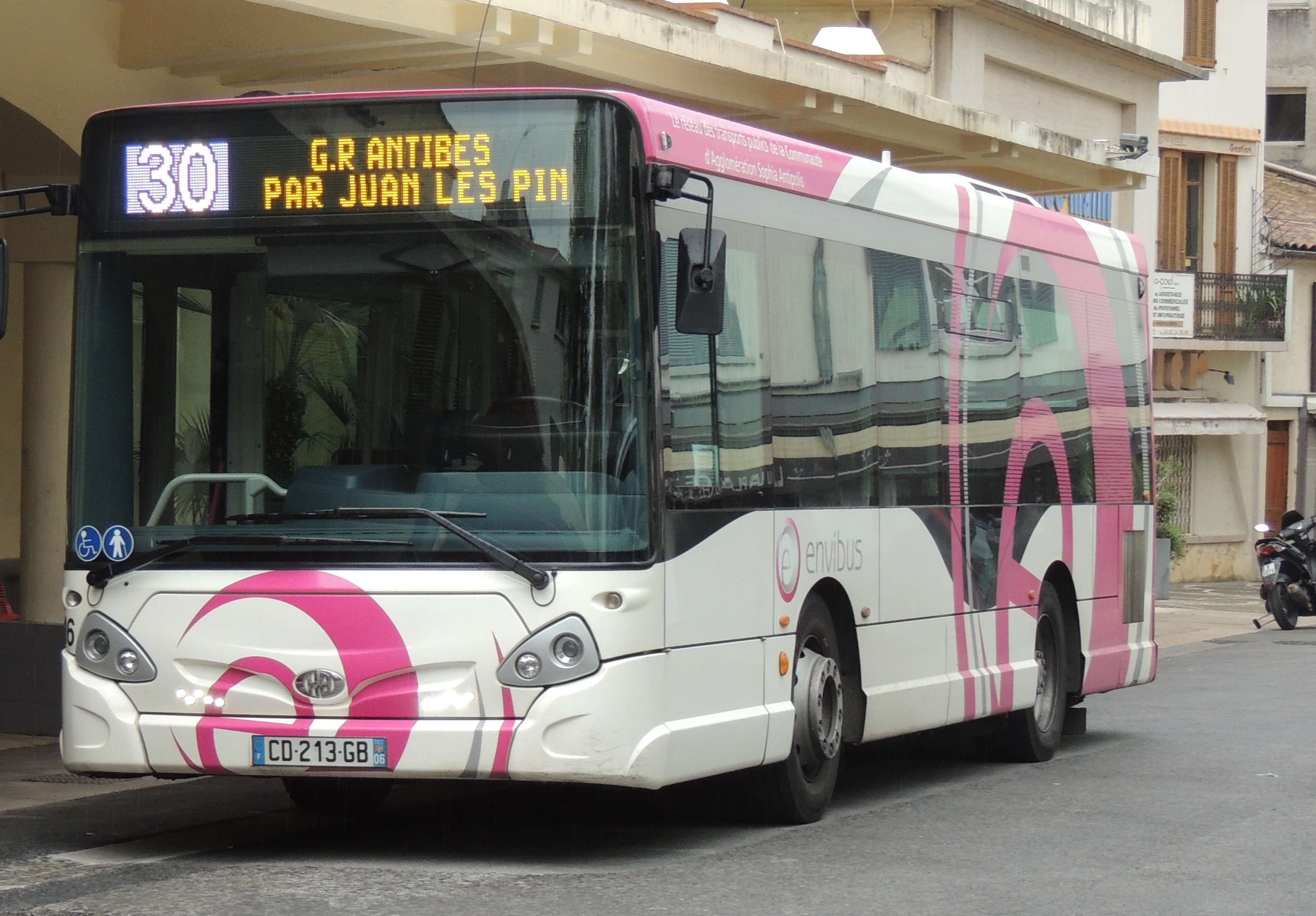 bus 30